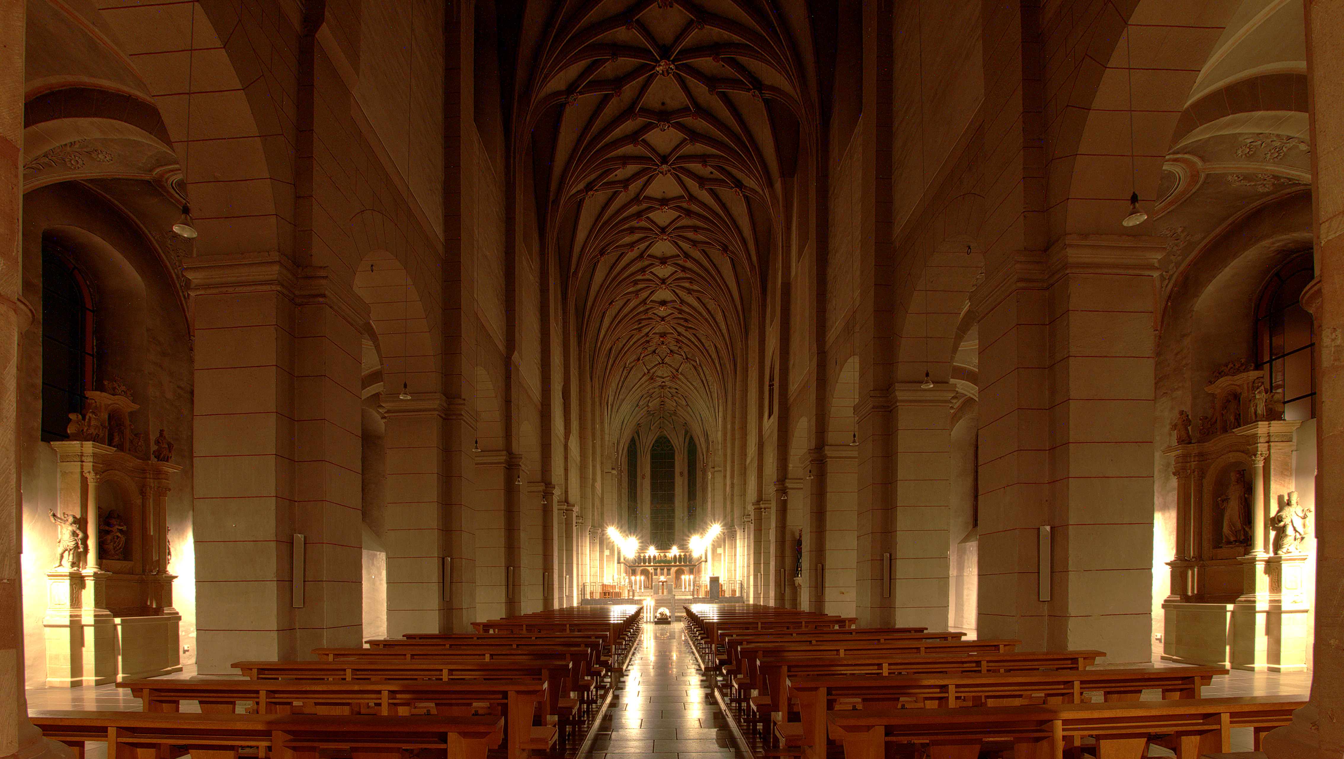 Schiff und Chor von St. Matthias in Trier